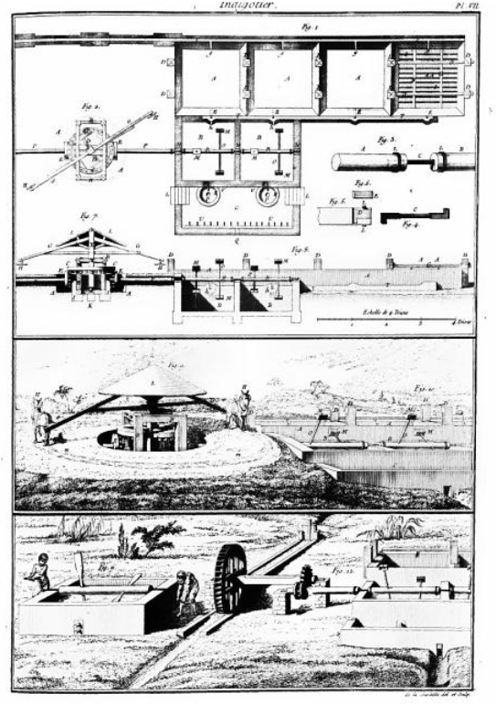 Planche illustrant diverses innovations technologiques pour la production d'indigo